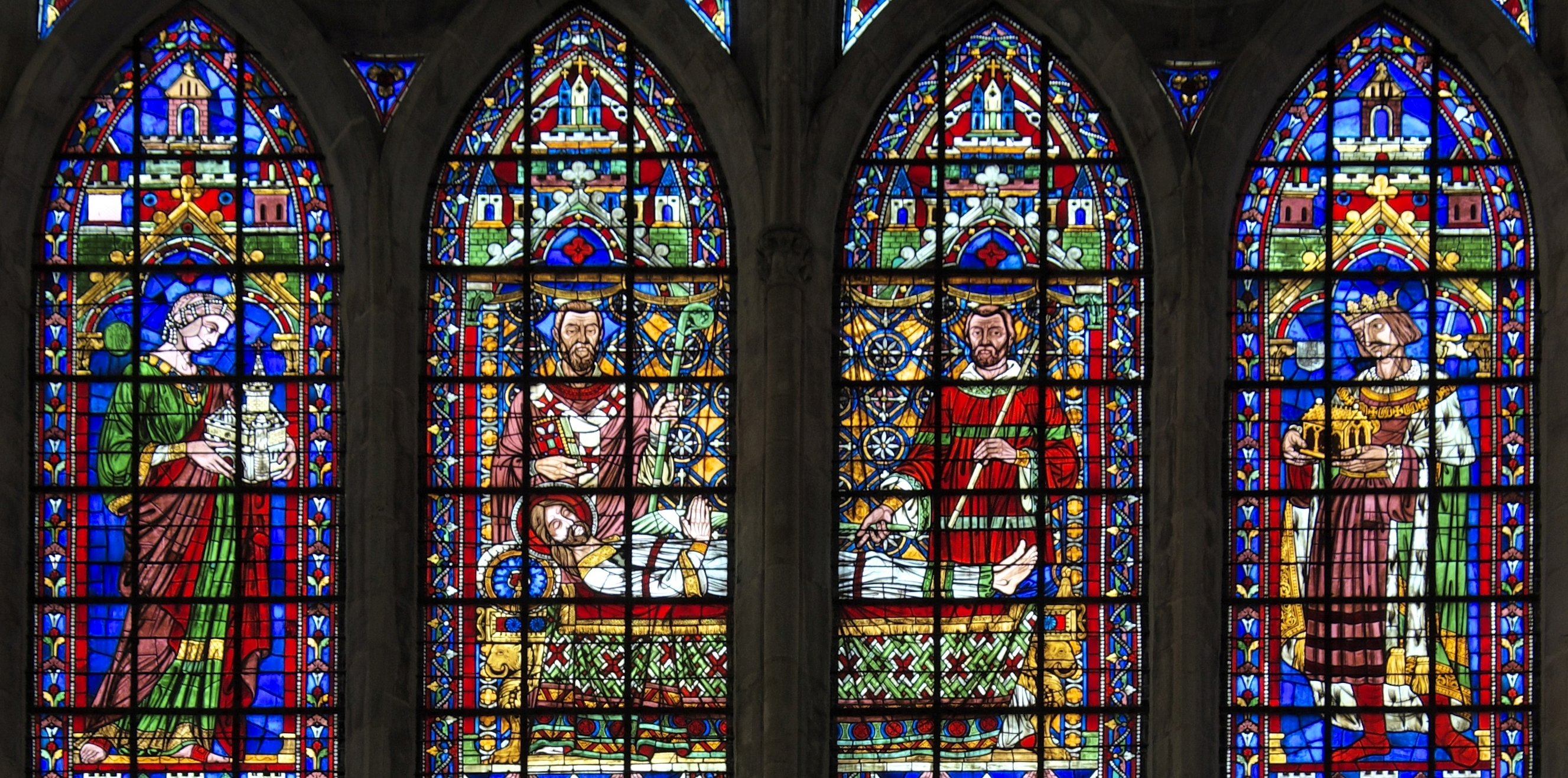 Élévation solennelle du corps incorrompu de Saint Étienne à Jérulalem en 415, détail d'un vitrail dans la Cathédrale Saint-Étienne de Toul, 19ème siècle